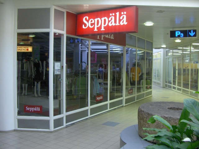 Seppälän myymälä Malmintorilla, Helsingissä.